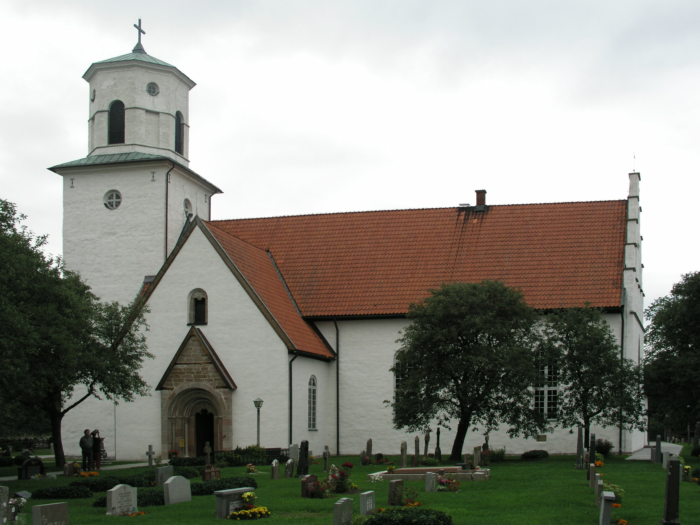 Gärdslösa kyrka/church